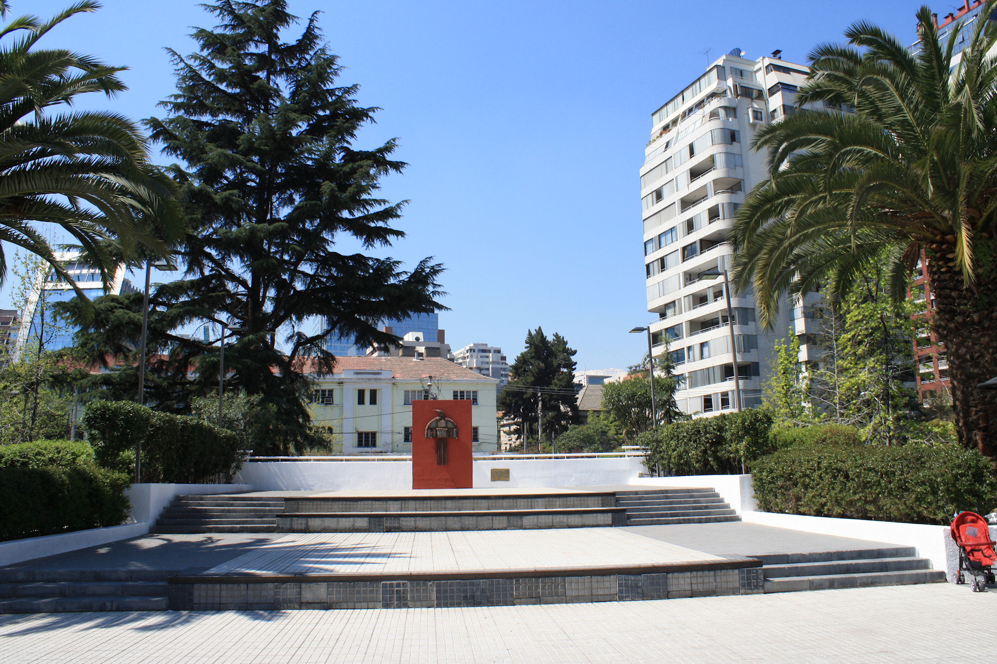 Plaza Perú, avenida Isidora Goyenechea, Santiago